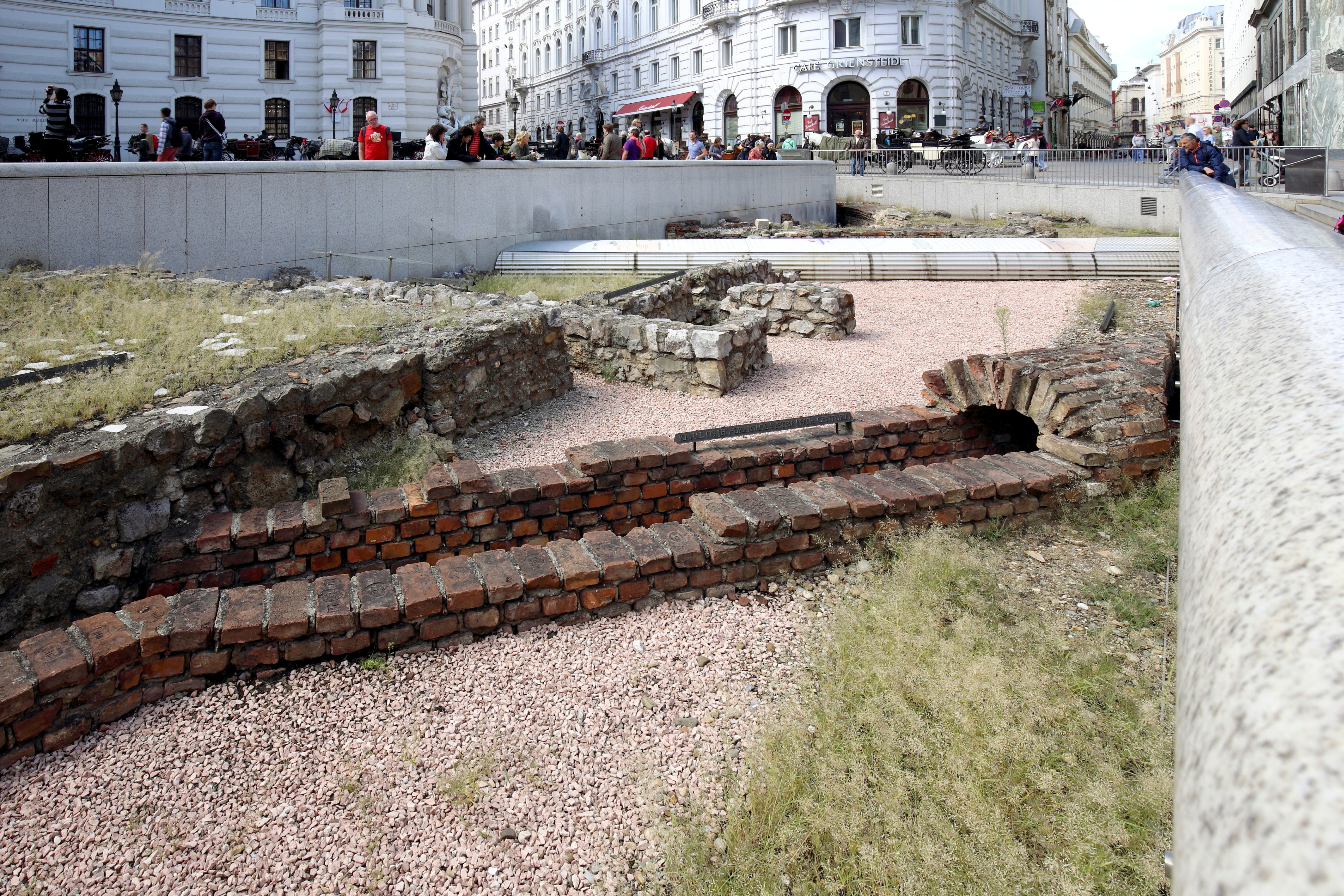 Archäologische Ausgrabungsstätte am Michaelerplatz im 1. Wiener Gemeindebezirk Innere Stadt.In den Jahren von 1989 bis 1991 wurde der Michaelerplatz großflächig archäologisch untersucht. Bei diesen Grabungen wurden neben mittelalterlichen und neuzeitlichen Resten auch Reste der römischen Lagervorstadt (Canabae) vorgefunden.